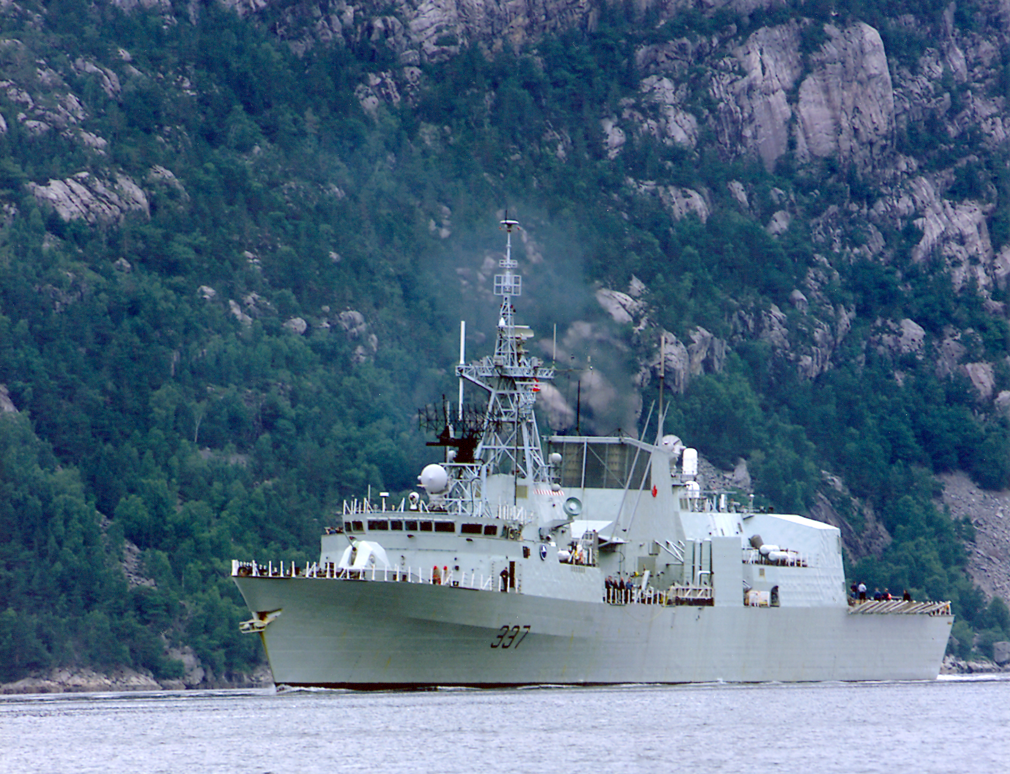 bateau grc